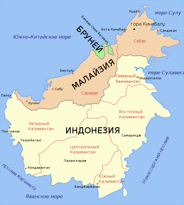 Геополитическое деление Калимантана (карта сделана на основе устаревшей версии карты)